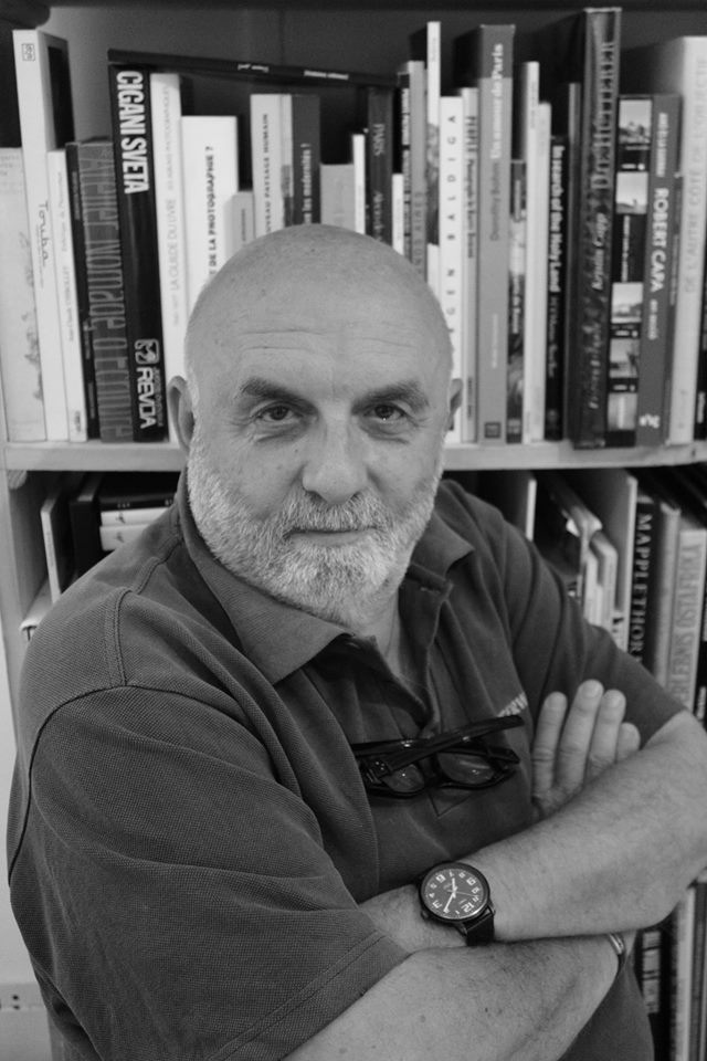 ritratto di Graziano Arici